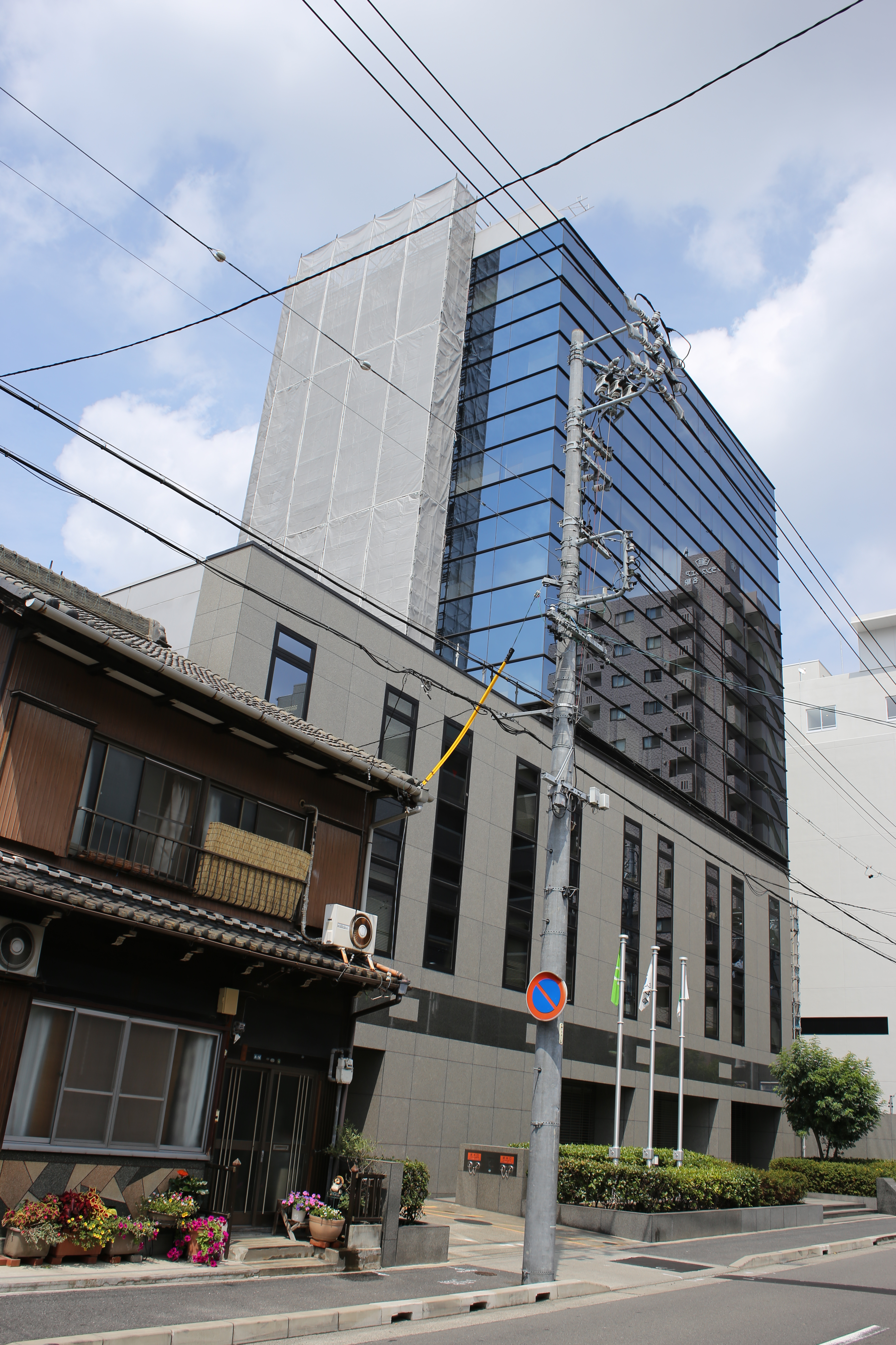 名古屋市中村区亀島一丁目のシーエヌ建設本社を南側公道西側より撮影